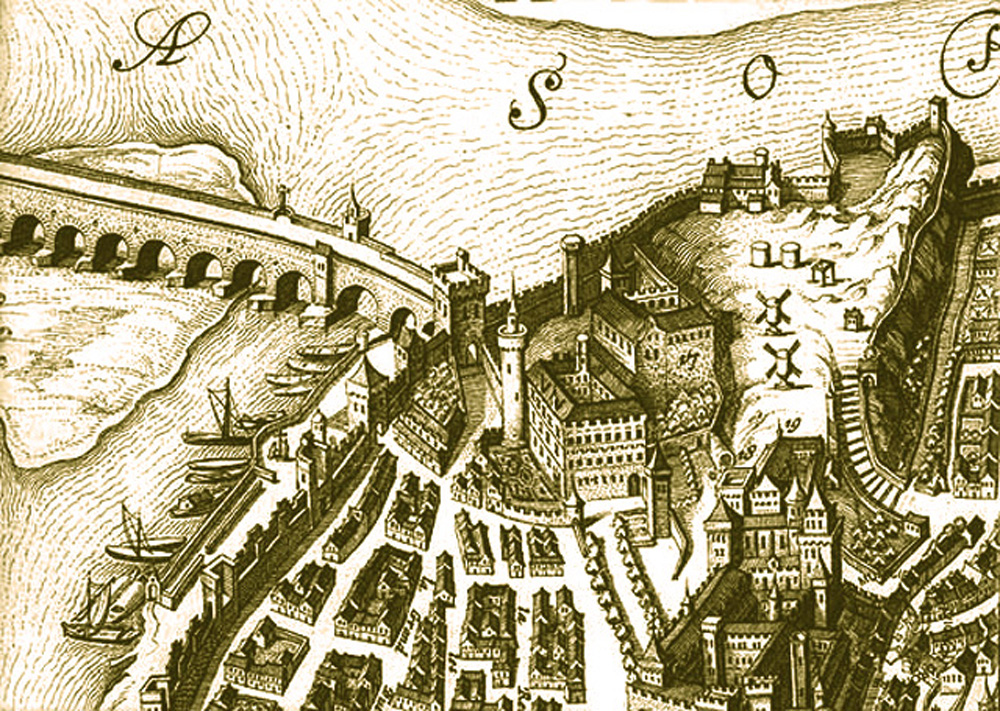 Moulins à vent sur le Rocher des Doms d'Avignon en 1630